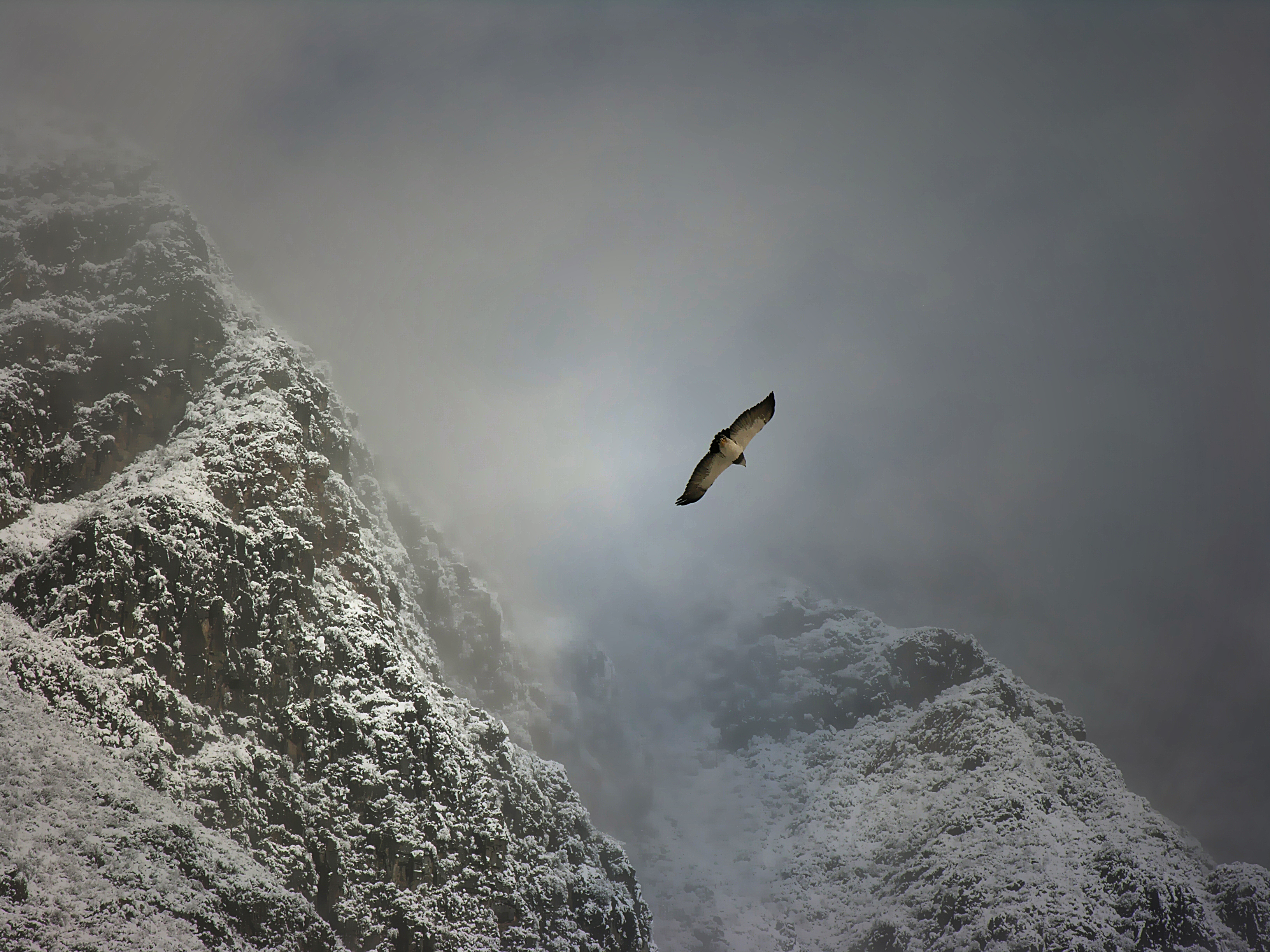 Tormenta de nieve en Cacheuta-Departamento de Lujan de Cuyo-Provincia de Mendoza